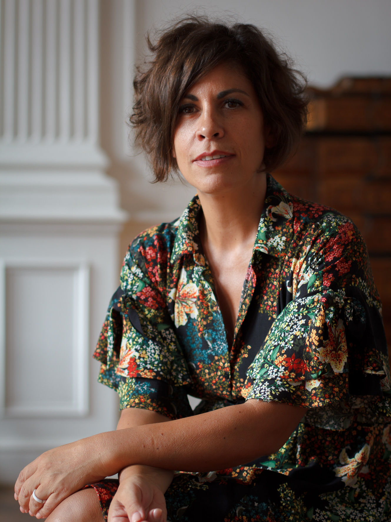 Julie Fernandez Fernandez à l'Hôtel de Ville de Liège Échevin de l'Etat civil des Mairies de quartier et des Cimetières de la Ville de Liège